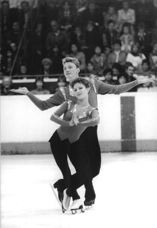 Jelena Walowa, Oleg Wassiljew ADN-ZB Oberst 2.10.87 Berlin: Internationales Schaulaufen- Die Vizeweltmeister im Paarlaufen Jelena Walowa - Oleg Wassiljew aus der UdSSR gehörten zu den Teilnehmern eines Internationalen Schaulaufens, das am 1.10.87 im Berliner Sportforum den Auftakt zu einer viertägigen DDR-Tournee gab. -Siehe auch Motiv 1987-1002-19 und 21N